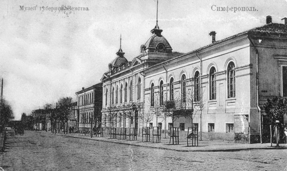 Музей губернского земства (1895—1917), Симферополь, Екатерининская улица.